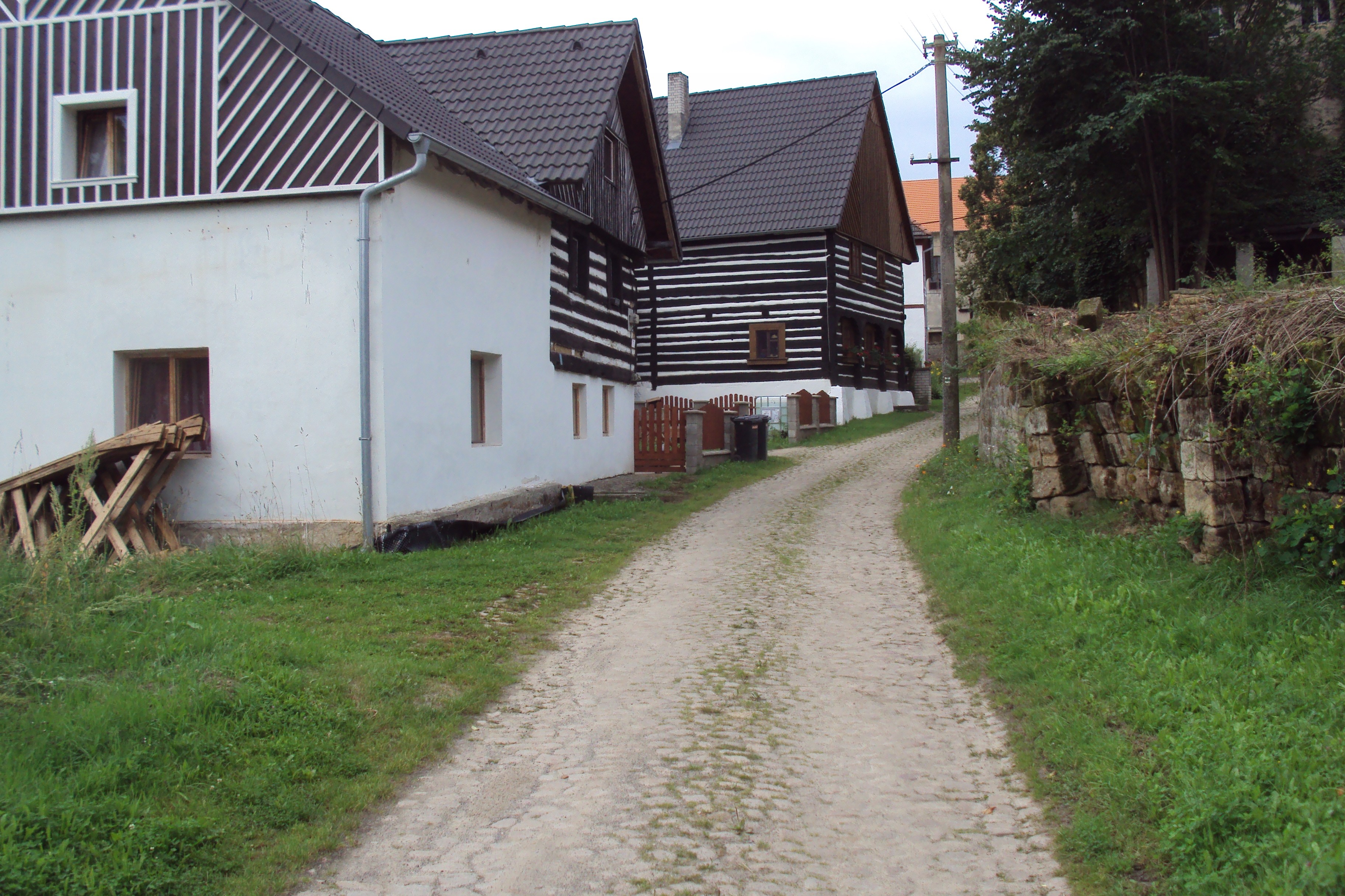 Některá stavení v Bořejově